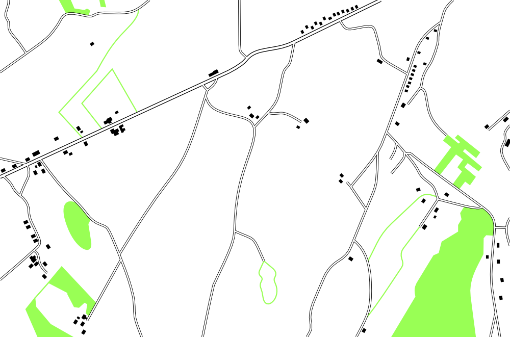 Plan du quartier de Planoise à Besançon réalisé à partir des cadastres de 1967.